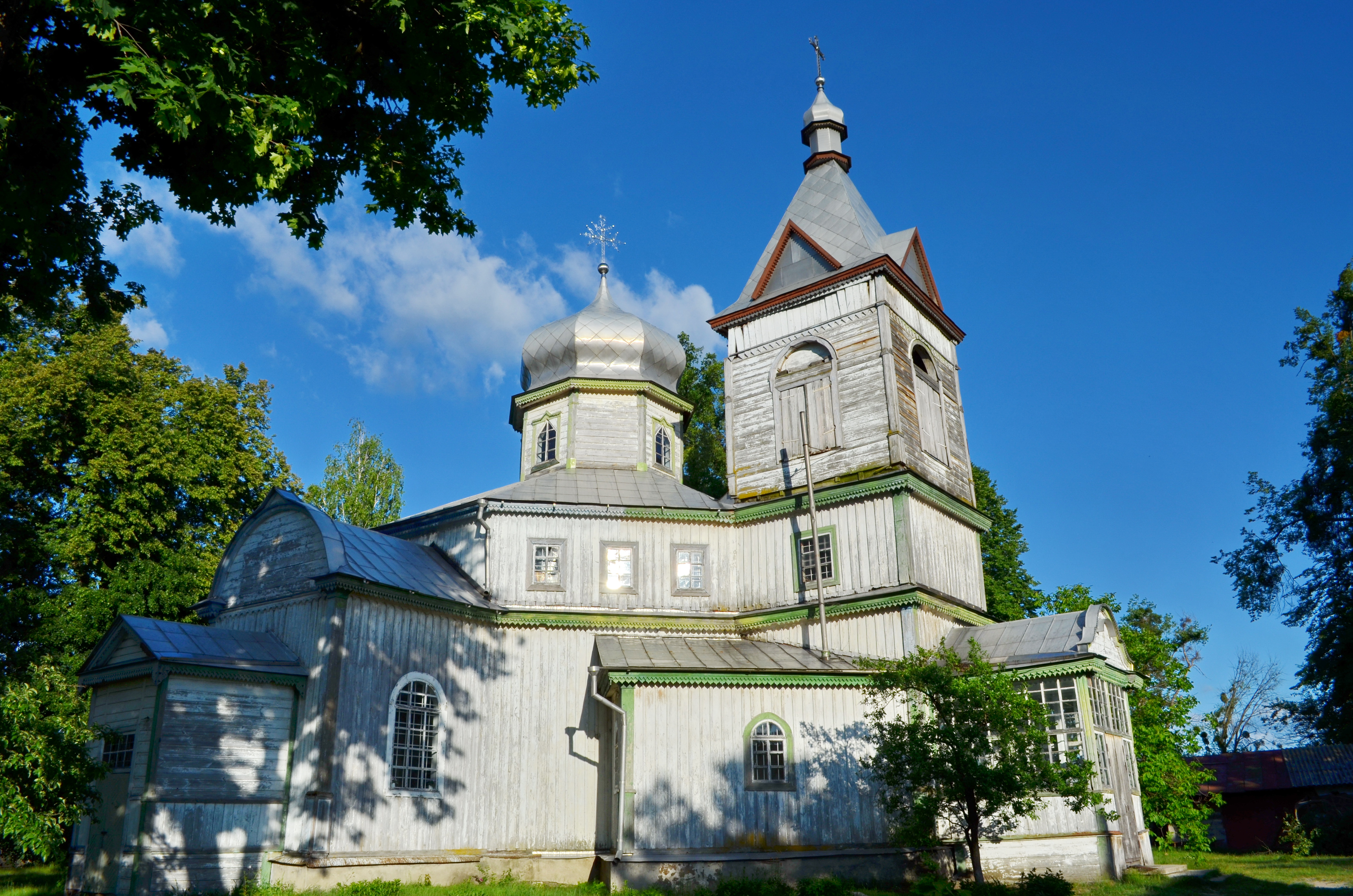 Церква Косьми і Даміана. 1752, 1874р., село Коленці, Іванківський район, Київська область